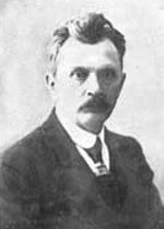 Малюшицький Микола Кирилович